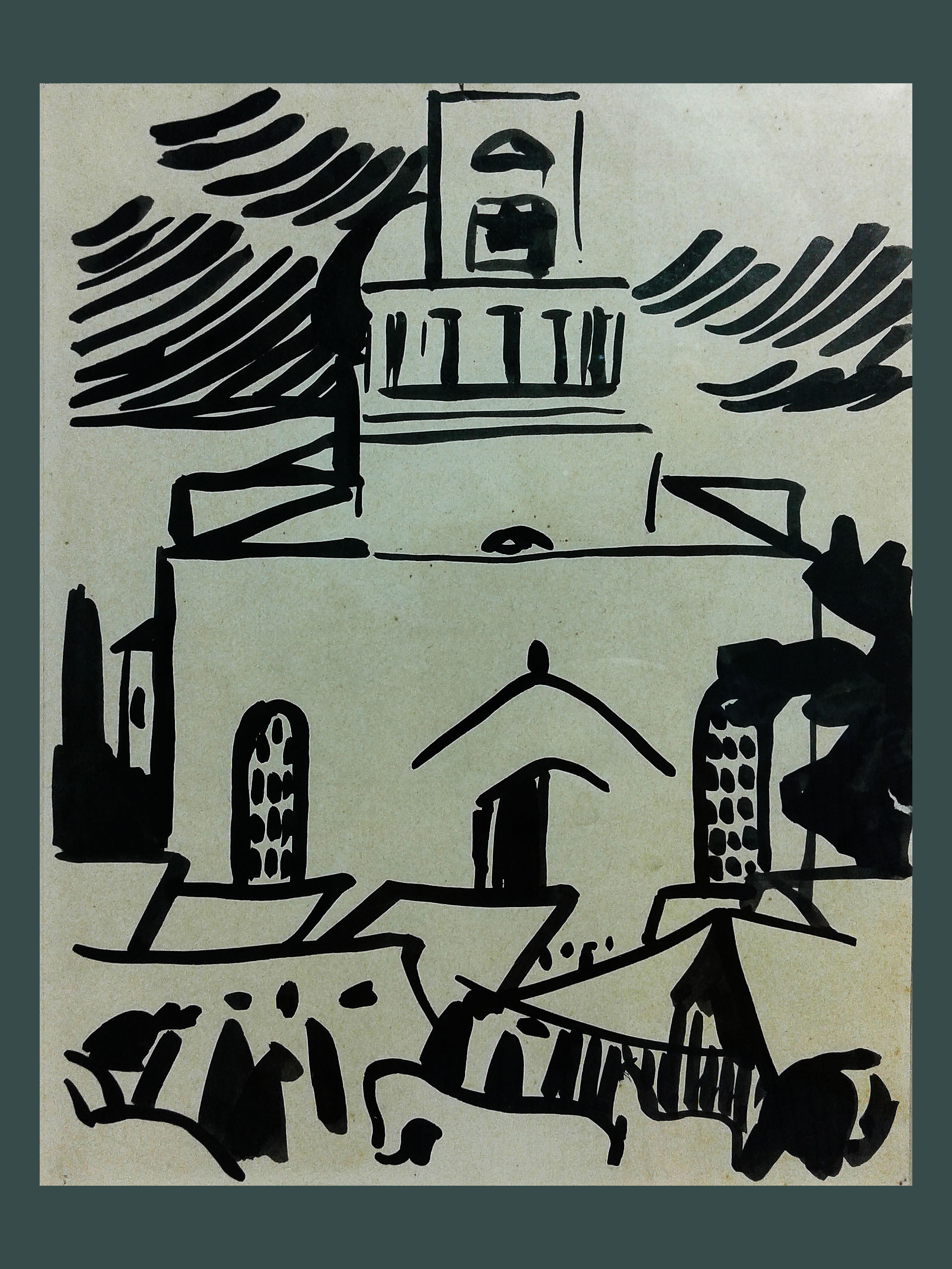 Олександр Богомазов. Київський пейзаж, 1910-ті. Папір, гуаш